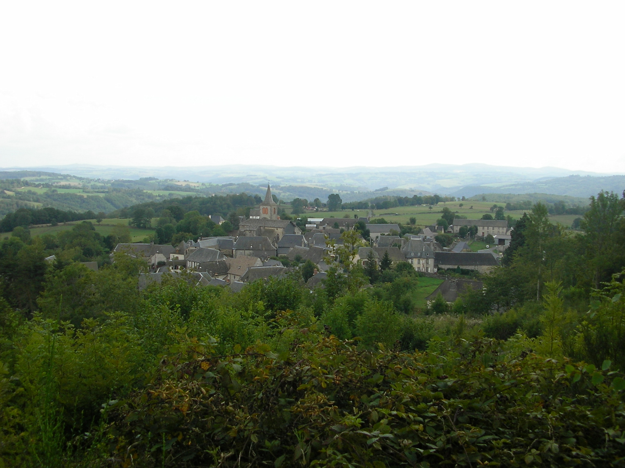 Vue d'Oradour en 2006.